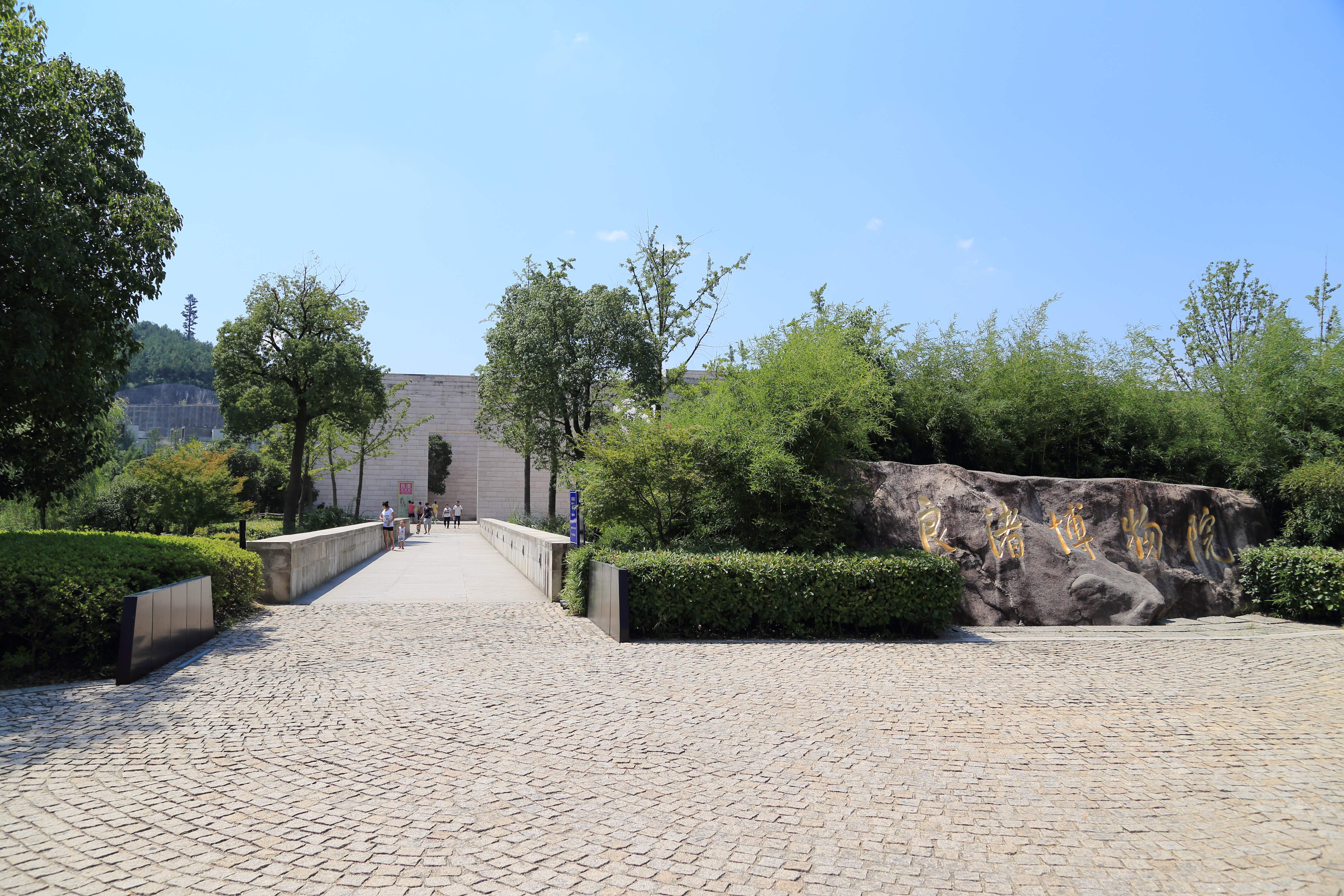 杭州良渚博物院 东南入口